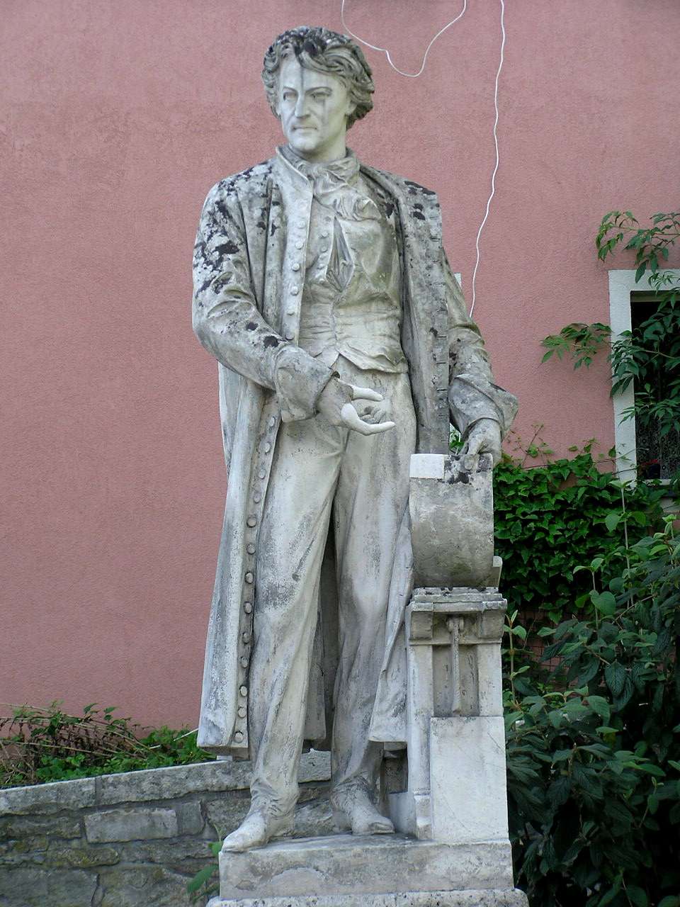 Hippolyte Maindron (1801-1884), Alois-Senefelder-Denkmal, Solnhofen.